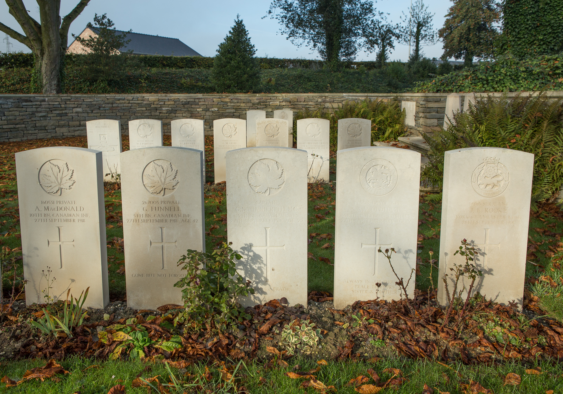 Quarry Cemetery (Marquion)